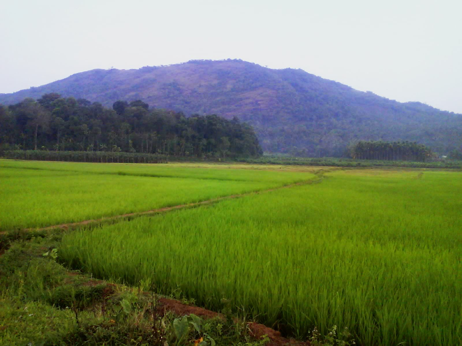 നെല്‍വയല്‍